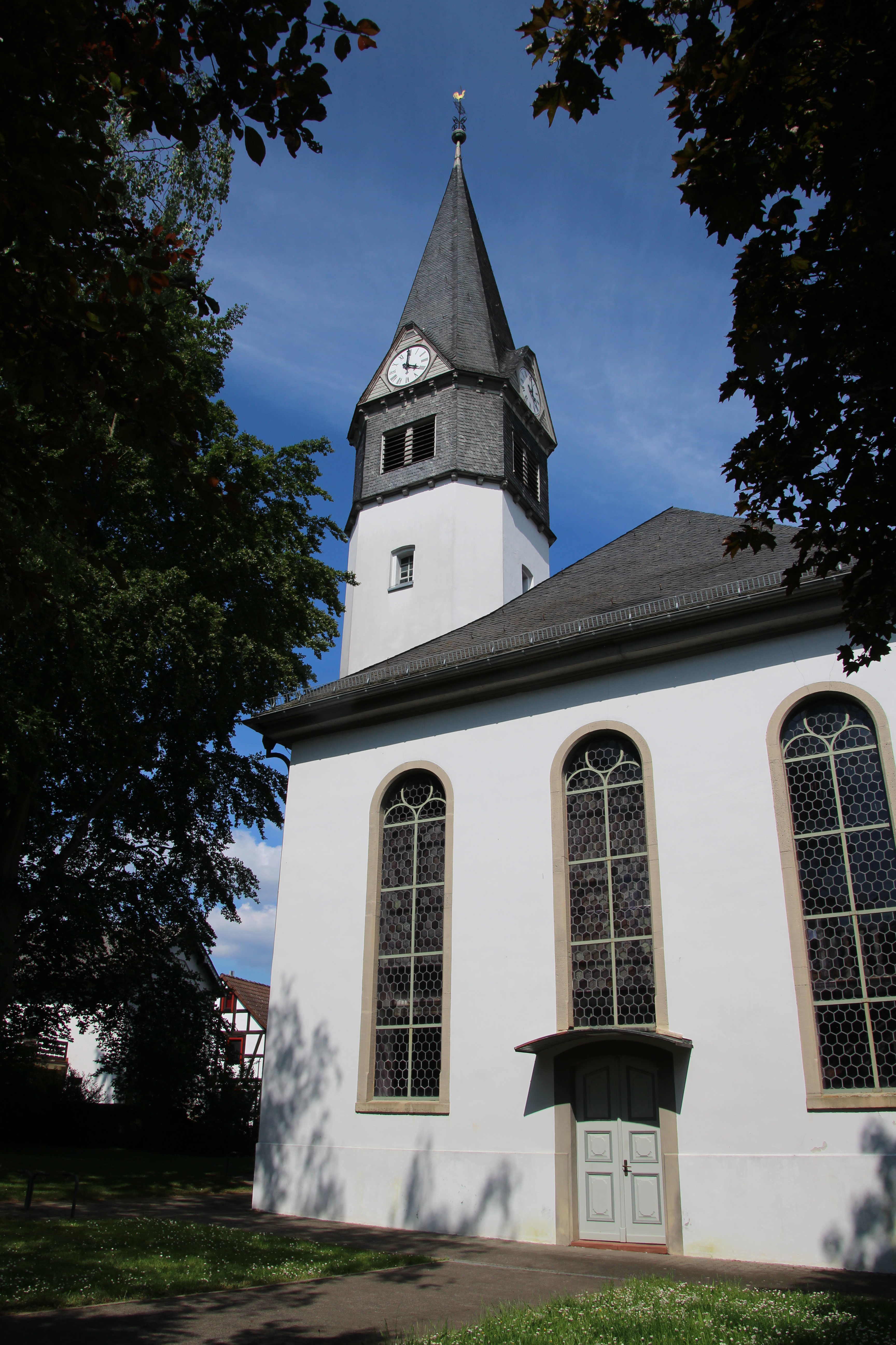 Ev Kirche Atzbach - Westseite